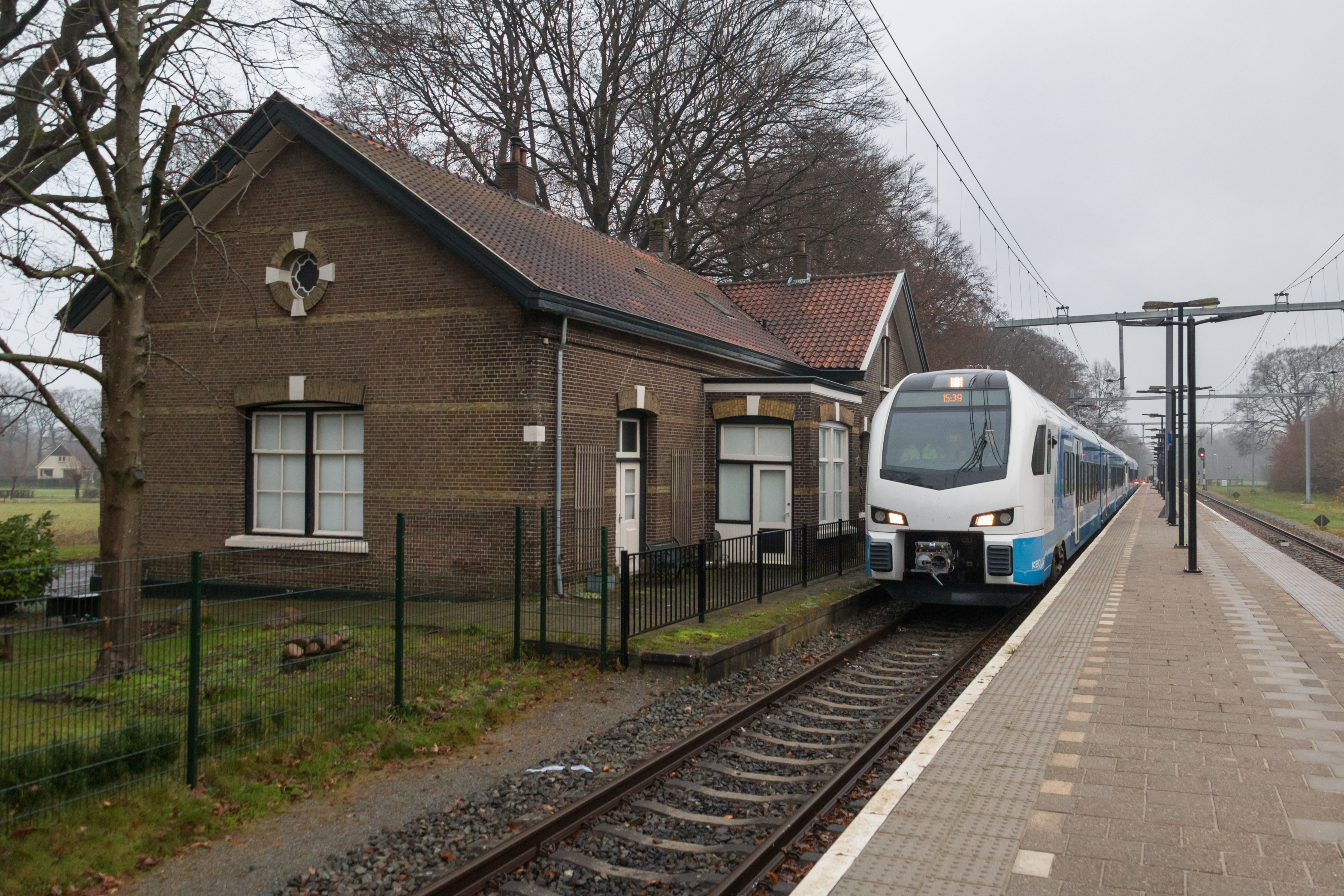 Keolis Nederland FLIRTs 7301 en 7308 tijdens een testrit op station Heino